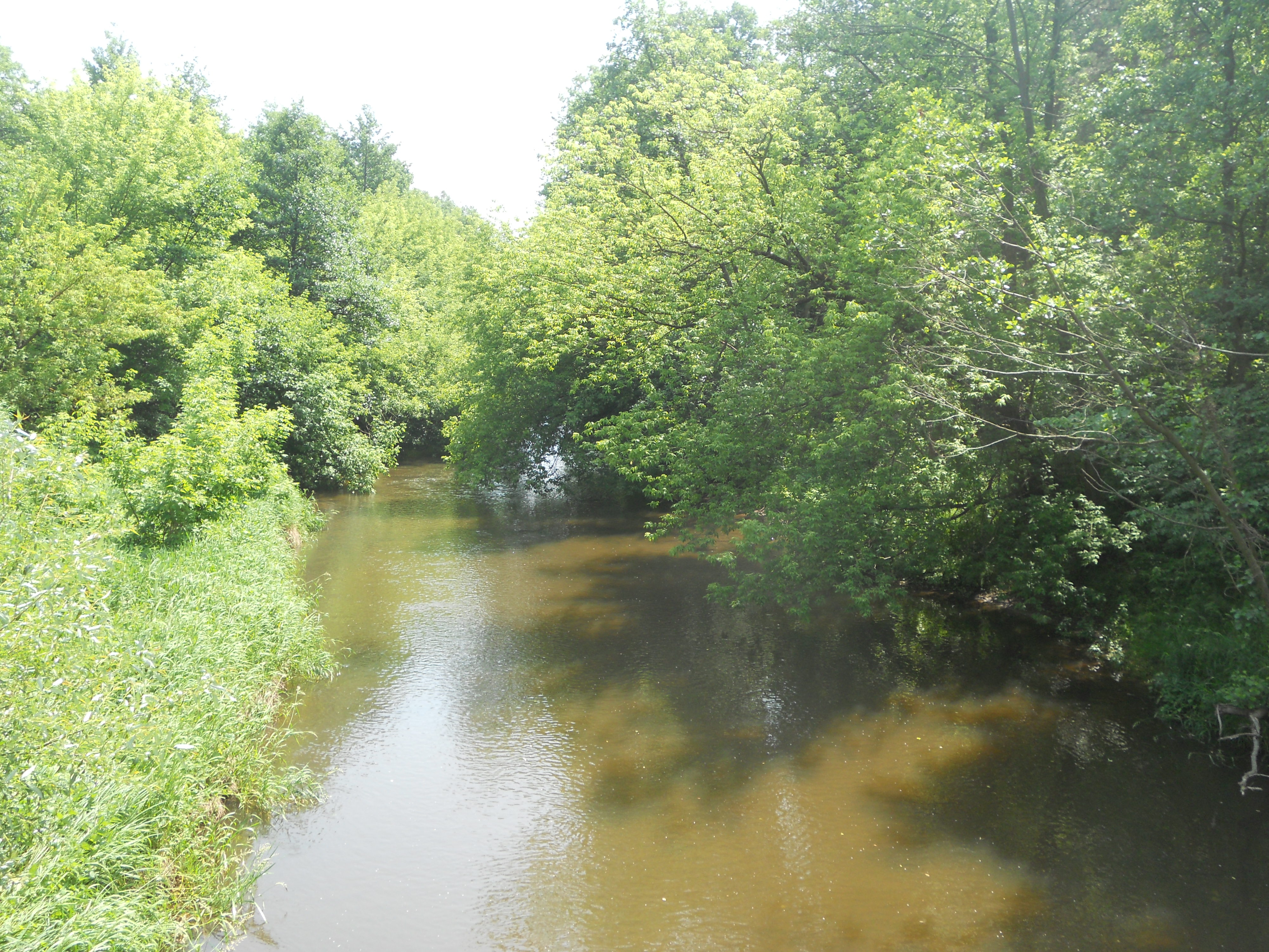 Świder w Wólce Mlądzkiej (ul. Wspaniała)